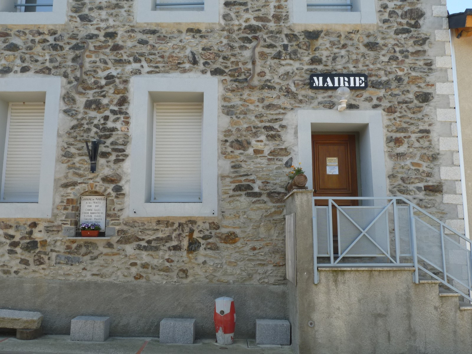 Mairie de Nahuja, Pyrénées-Orientales, France